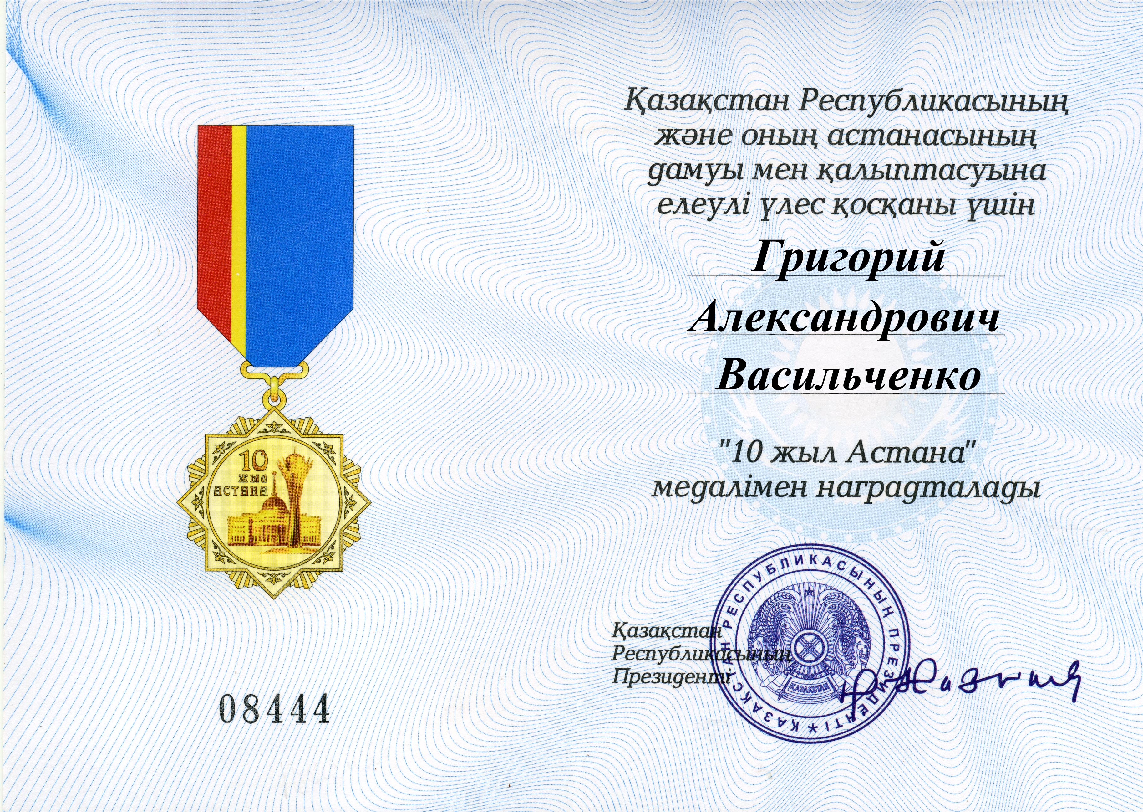 Удостоверение к медали Республики Казахстан «10 лет Астане»